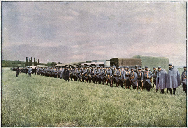 Autochrome in Les Champs de bataille de la Marne par Gervais-Courtellemont intitulée : la journée décisive du 9 septembre 1914,Une compagnie d'aviaterus, bibliothèque municaple de Reims sous la référence :RG_38_n°08_Page_115.